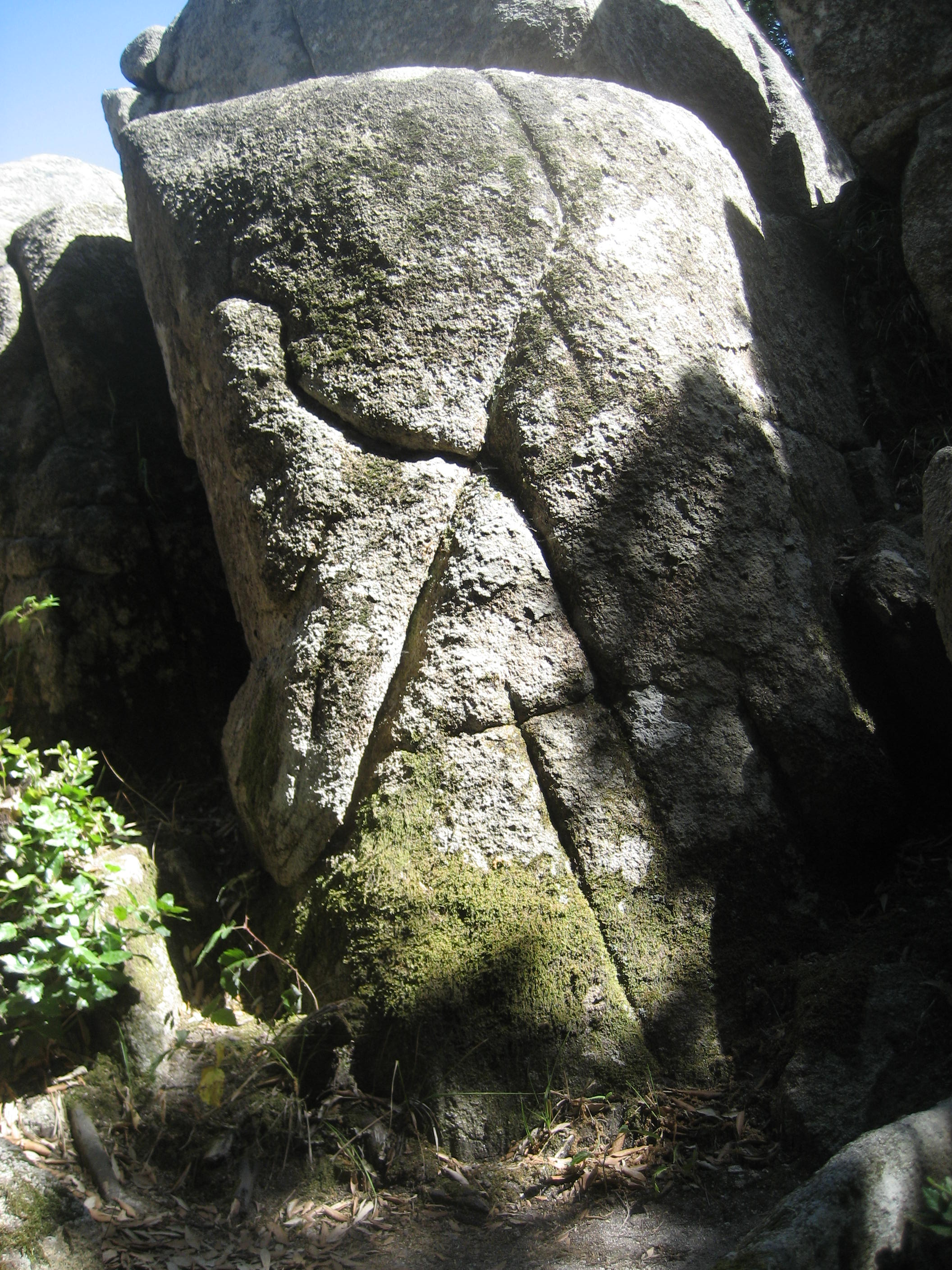 Pietre_sito_B (Nardodipace)